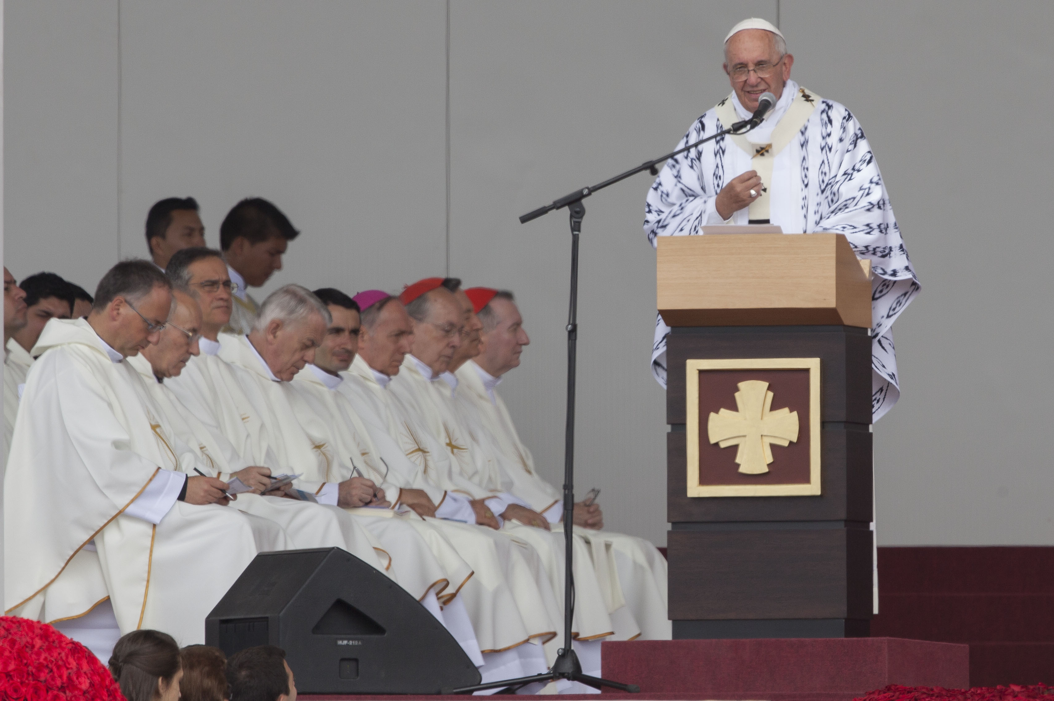 Quito, Ecuador. 07 de julio de 2015. Misa celebrada por el Papa Francisco en el parque Bicentenario, Quito. Carlos Pozo / Cancillería Ecuador